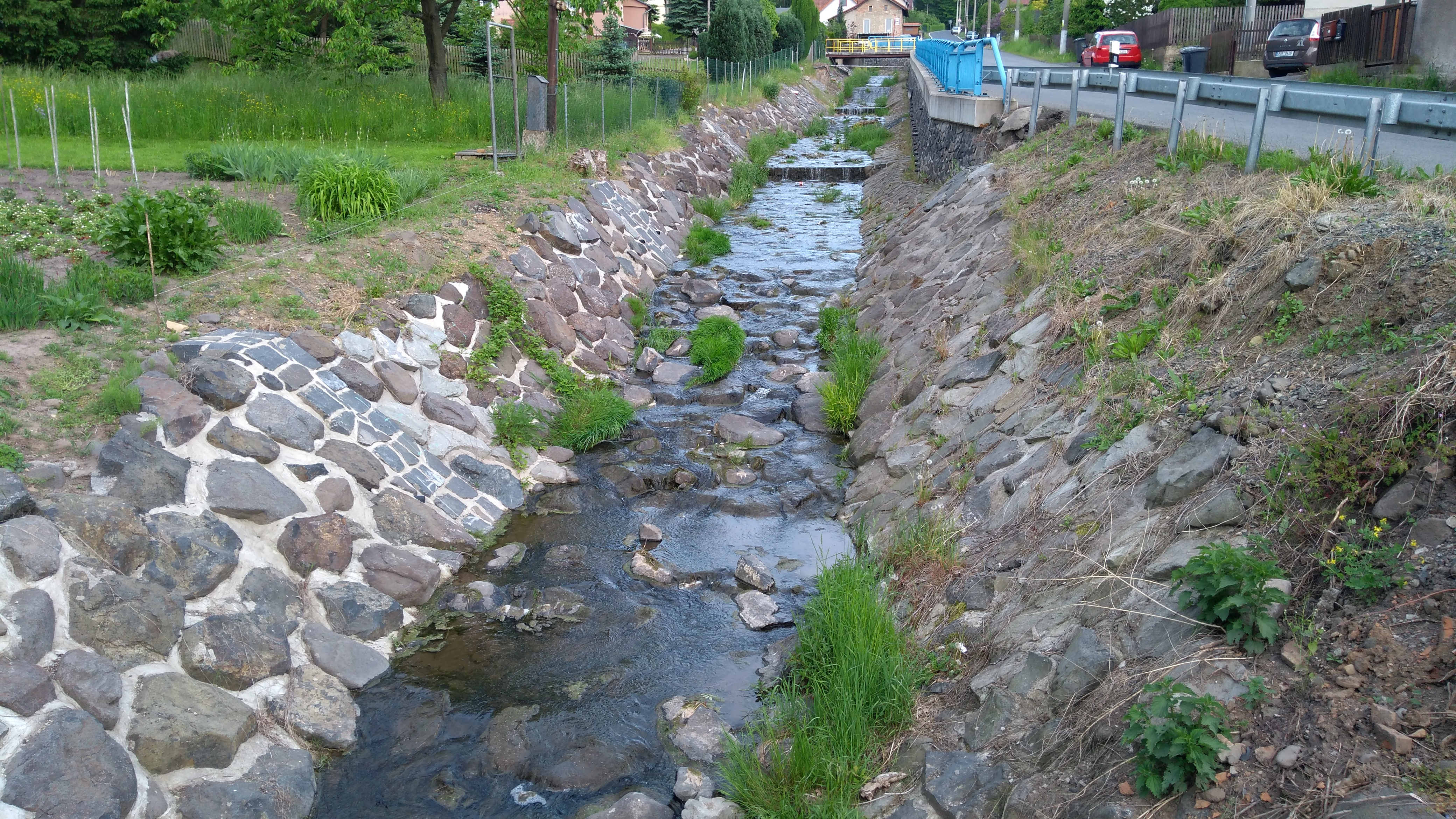 Potok